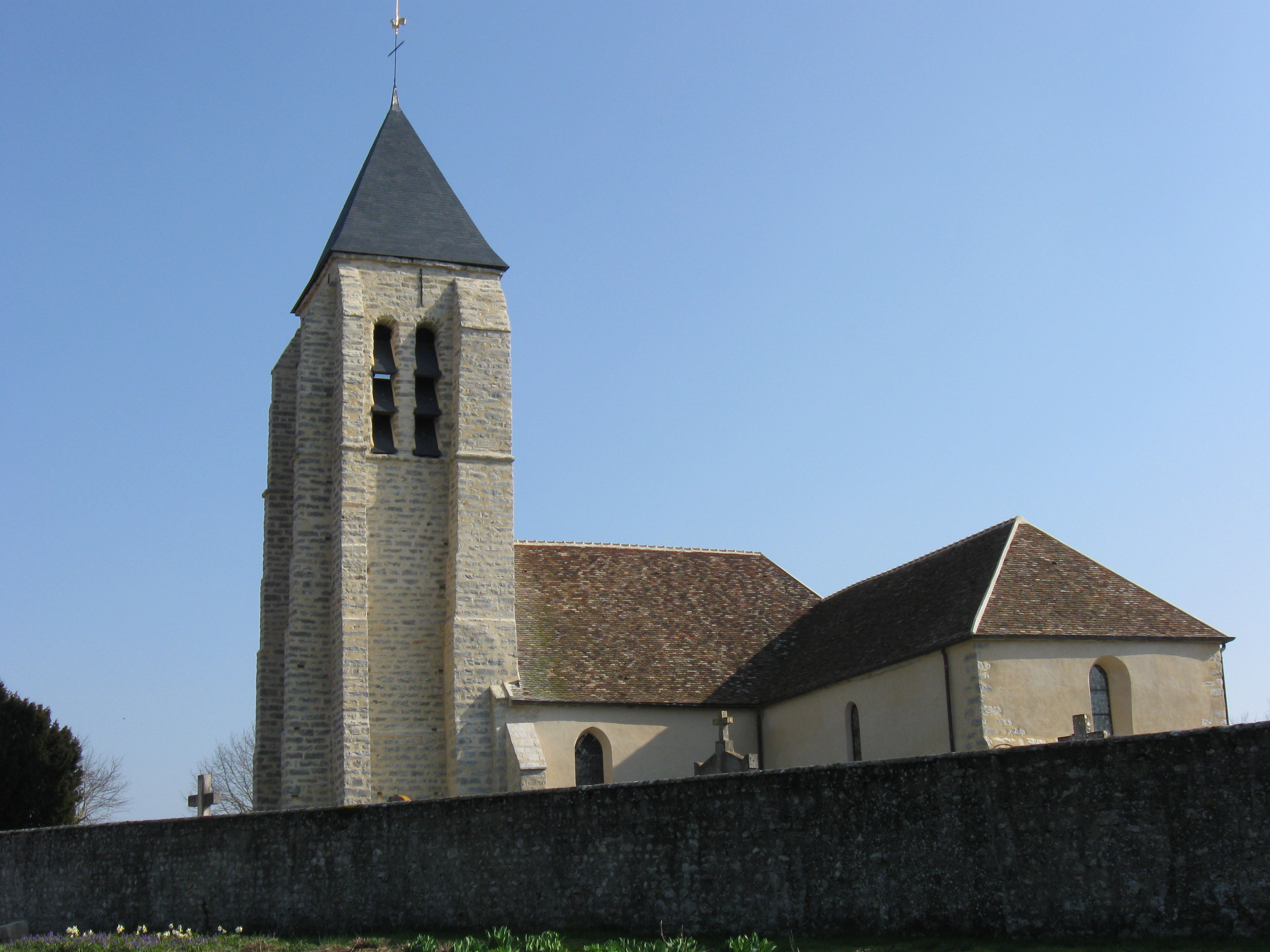 Église Saint Étienne, Moncourt-Fromonville (Seine-et-Marne, région Île-de-France)